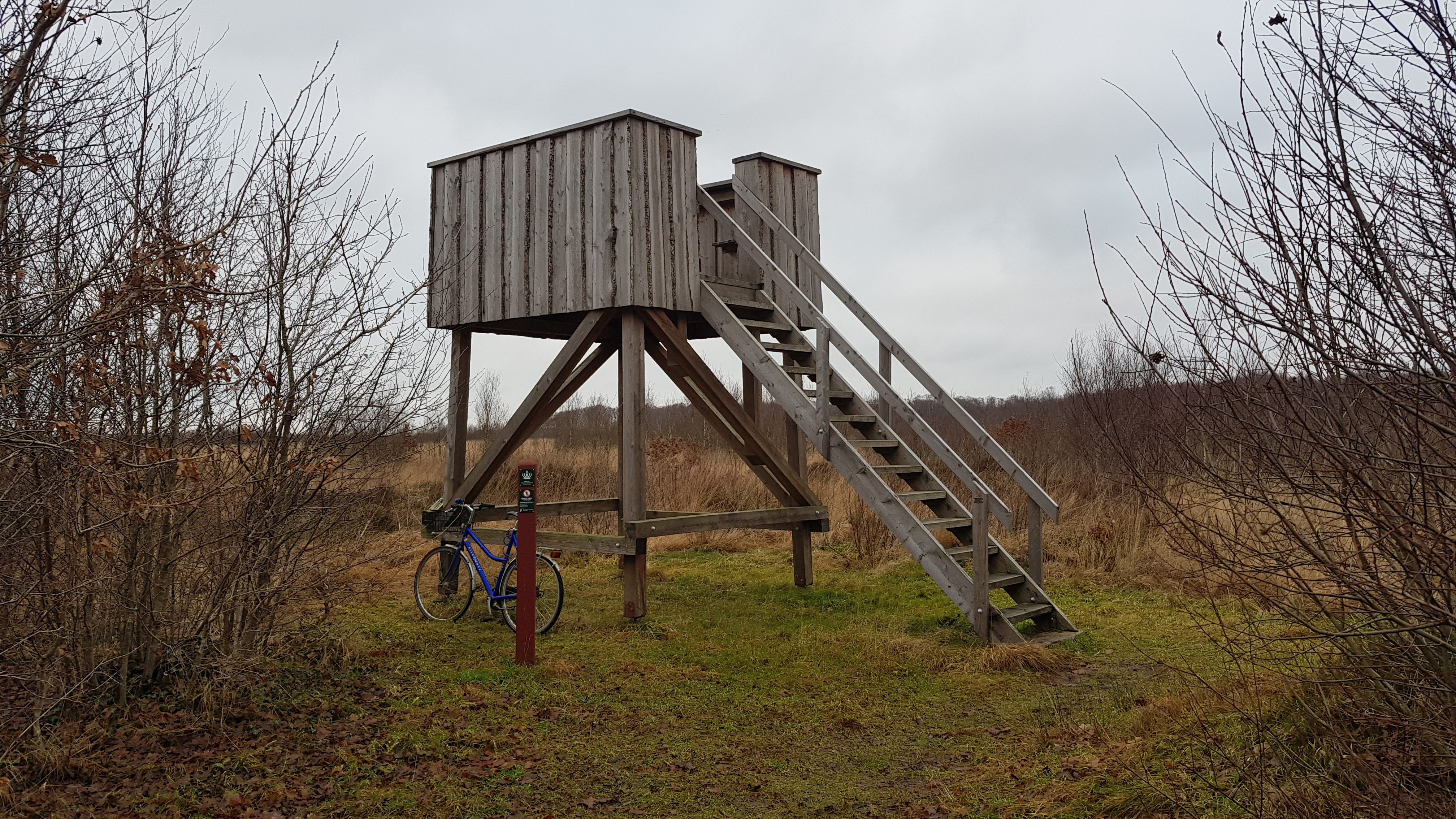 Kongens Mose: Fugletårnet ved Teltkrovej